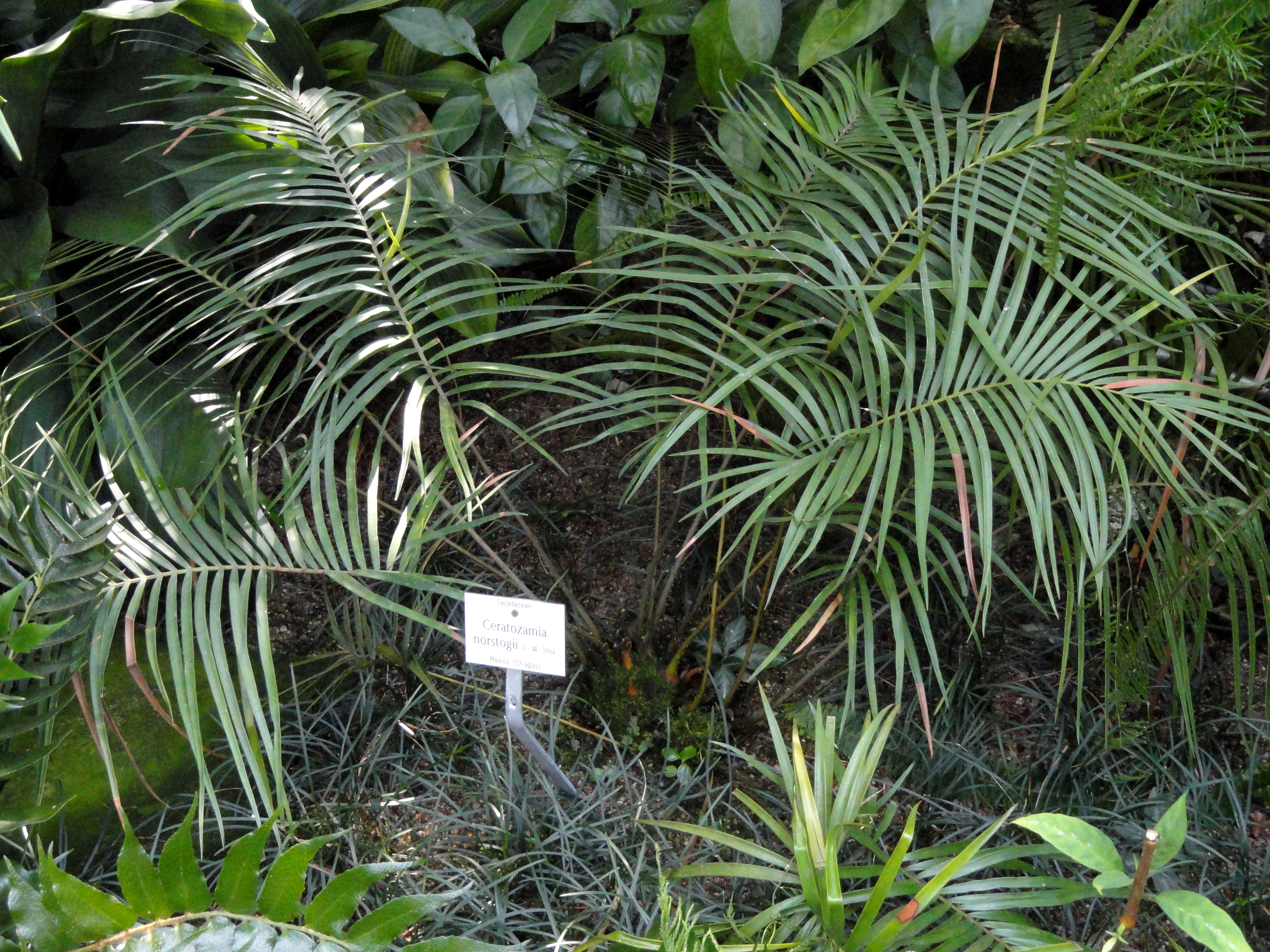 Ceratozamia norstogii specimen in the Botanischer Garten München-Nymphenburg, Munich, Germany.